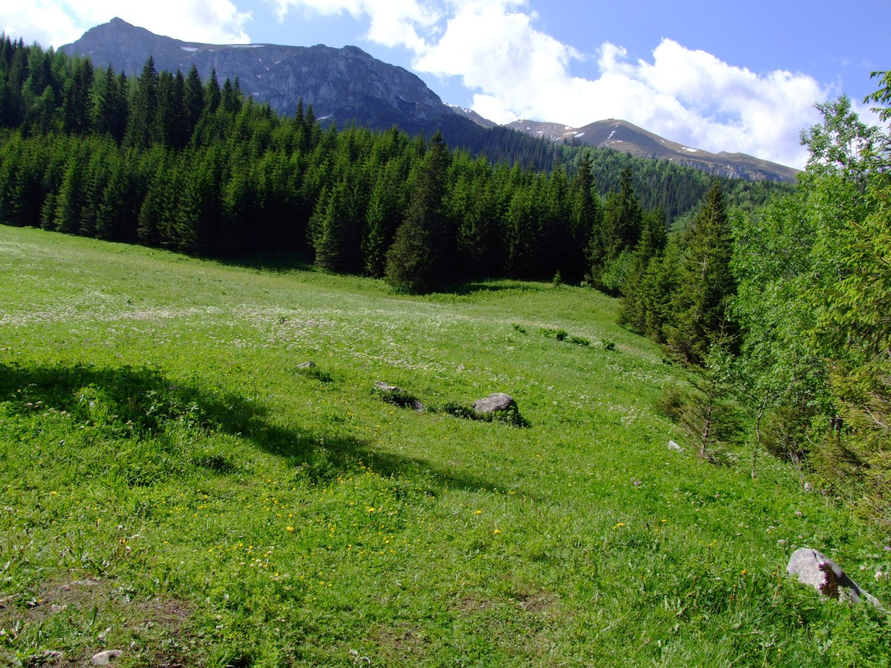 Mała Polanka Małołącka